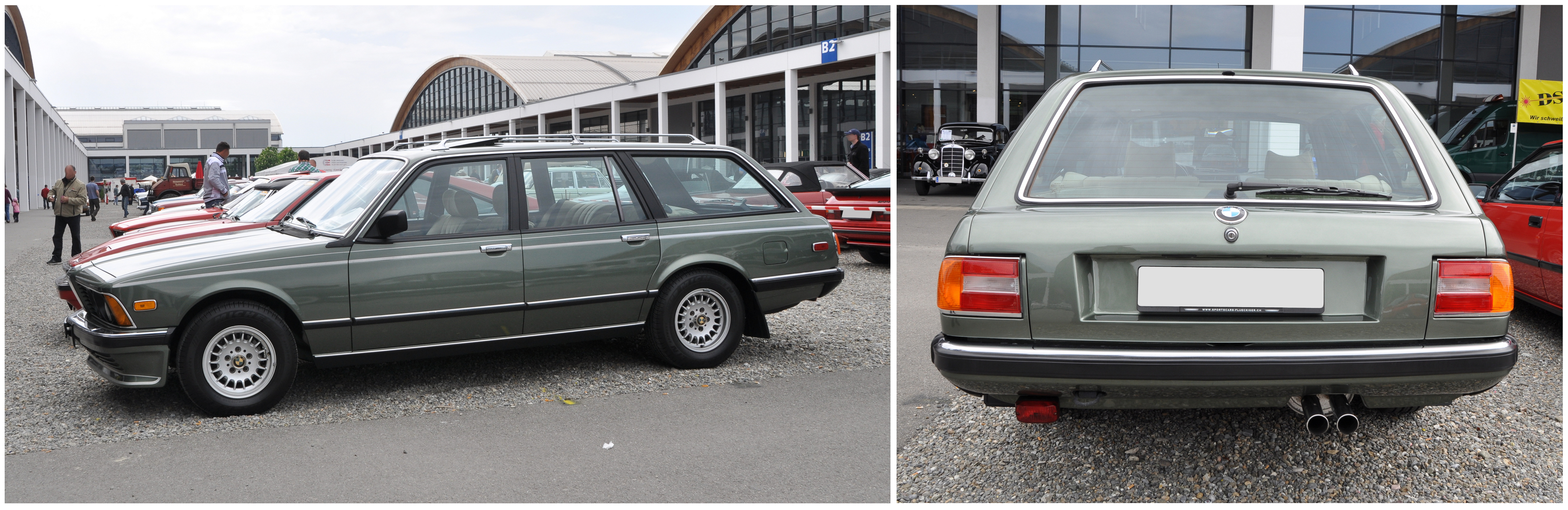 Ein BMW 735i Touring der Baureihe E23.